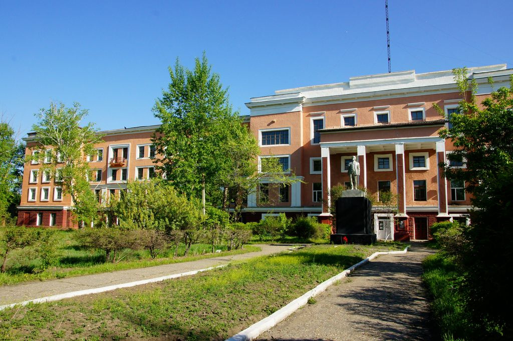 Жд техникум в г. Свободном